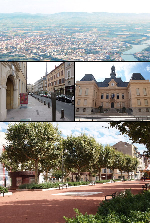 Différentes vues de Villefranche